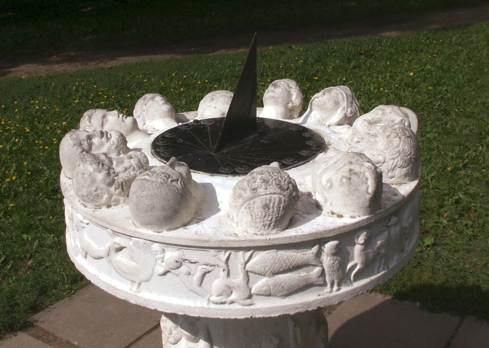 Švėkšnos saulės laikrodis